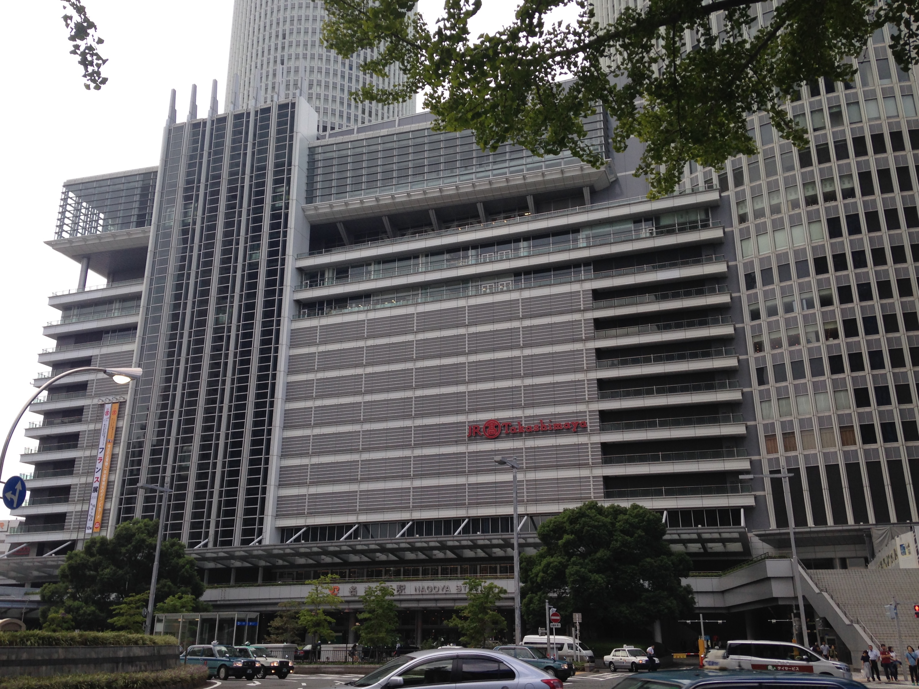 名古屋駅・桜通口